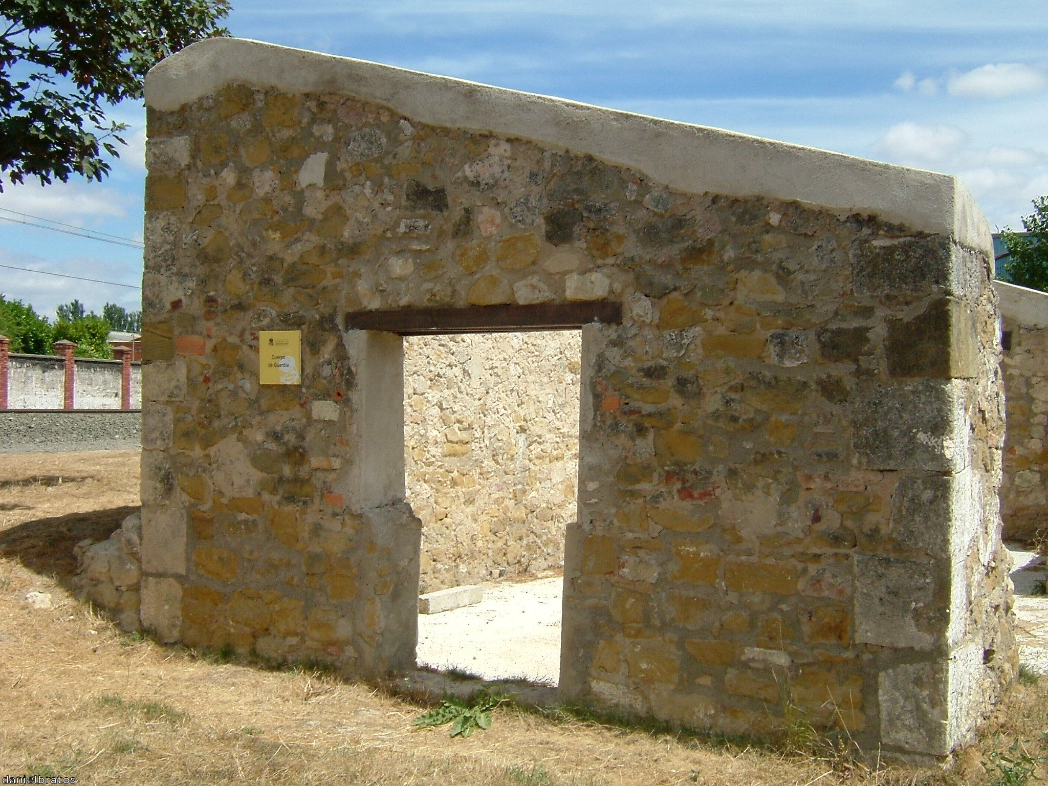 Restos del edificio del Cuerpo de Guardia del campo de concentración de Miranda de Ebro